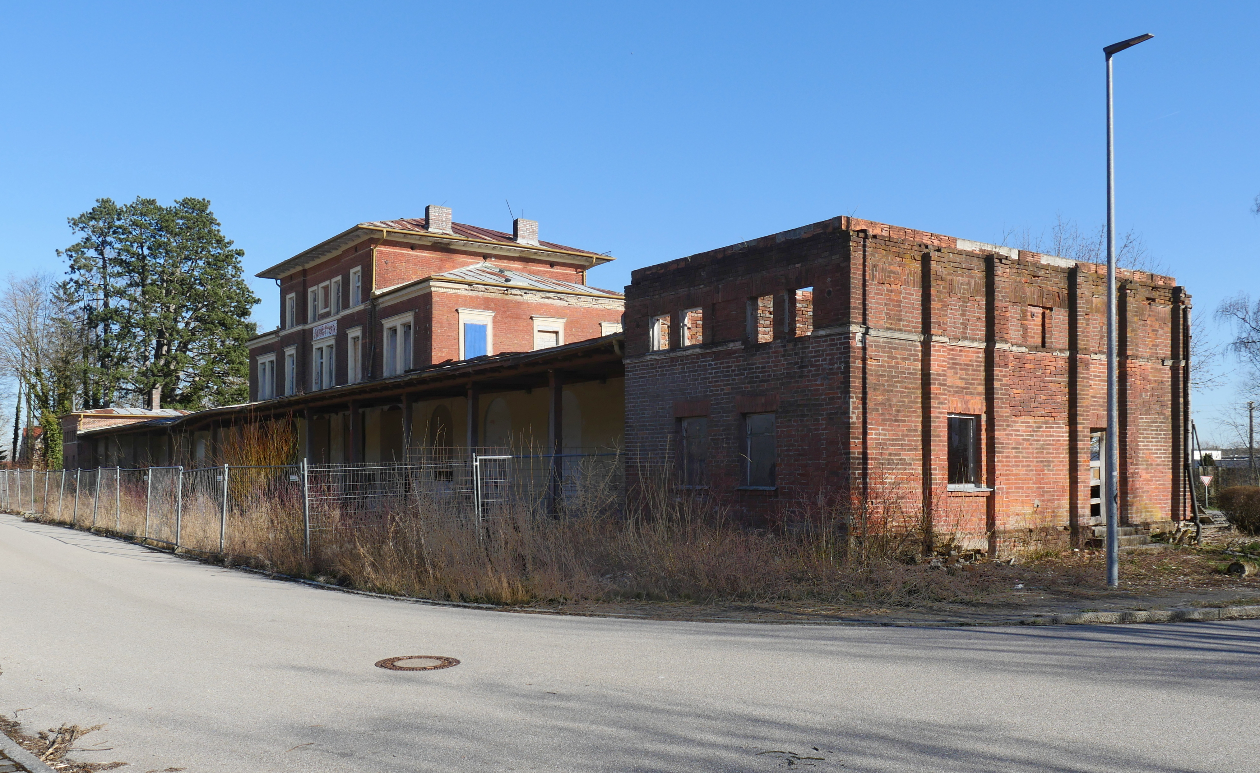 Verfallenes Empfangsgebäude des ehemaligen Bahnhofs Neuötting von der Gleisseite. Rechts im Vordergrund das westliche Nebengebäude, in dem sich ursprünglich die Aborte befanden. This is a photograph of an architectural monument.